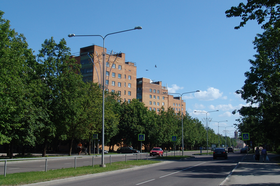 Кренгольмский проспект. Вид на дома 29, 33, 37 (арх.Р.-Л. Киви)